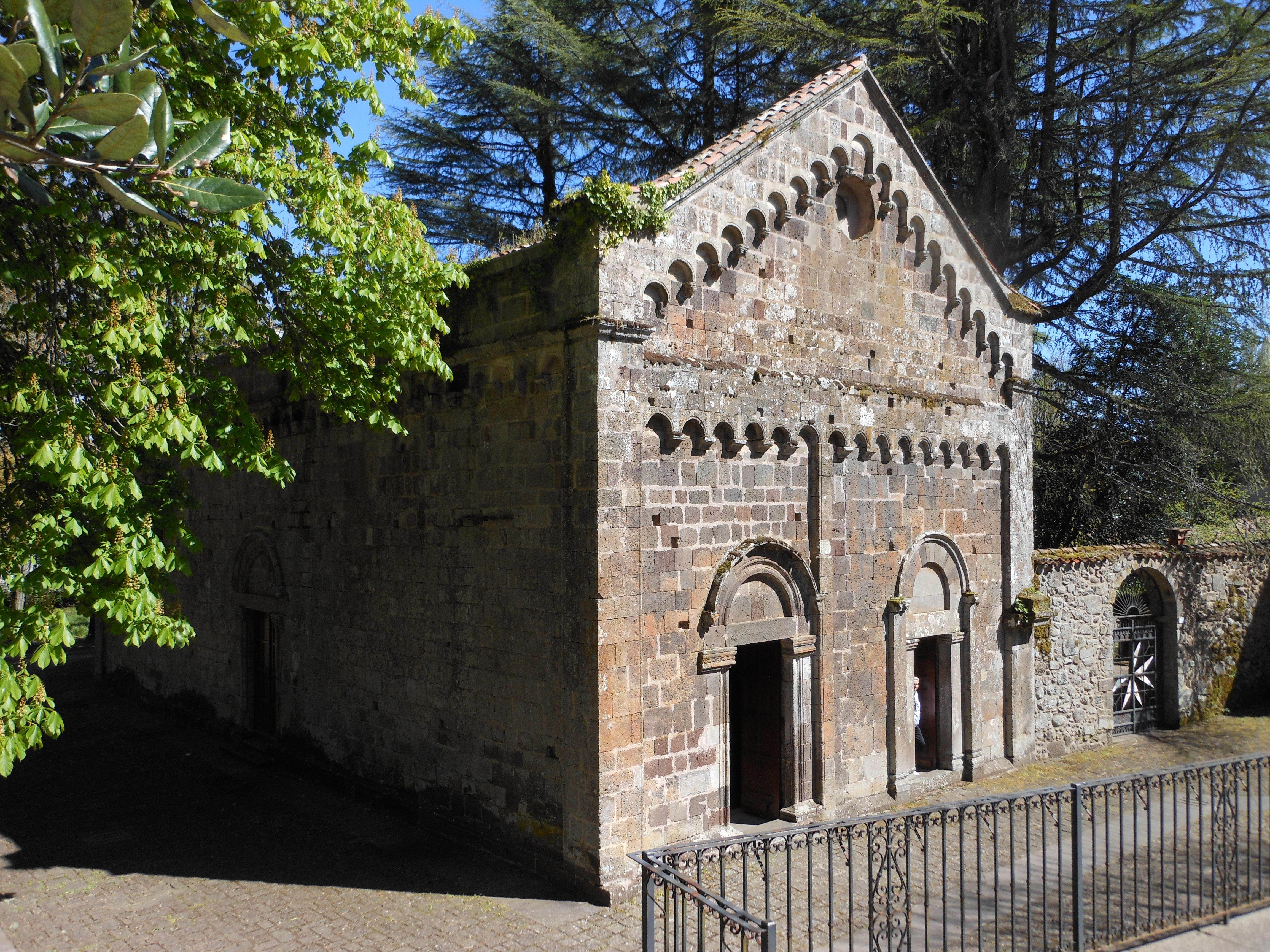 Santu Lussurgiu - San Leonardo di Siete Fuentes, Sardegna